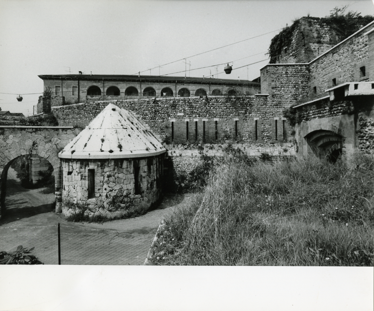 Servizio fotografico : Verona, 1972 / Paolo Monti. - Stampe: 2 : Positivo b/n, gelatina bromuro d'argento/ carta, 24x30. - ((Sul coperchio della scatola iscrizione didascalica manoscritta a pennarello nero: "Verona". - Occasione: Documentazione per la pubblicazione: Brugnoli Pier Paolo, "Nella bella Verona", Bologna, Cappelli, 1972. - di Brugnoli, Pier Paolo: Nella bella Verona, Bologna, Cappelli (1972). - Fonte: Fattura di Paolo Monti: IV. Commesse/ Fattura/ Fotografie per illustrazione del volume Verona (1972/12/20), presso Archivio Paolo Monti. N. 292 riprese fotografiche della città di Verona in formato 24x30. - Fonte: Quaderno di Paolo Monti: Leica 1501-3000 Controllo numerazione (1950-1978), presso Archivio Paolo Monti. - Fonte: Monografia